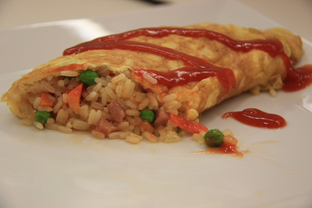 Omurice